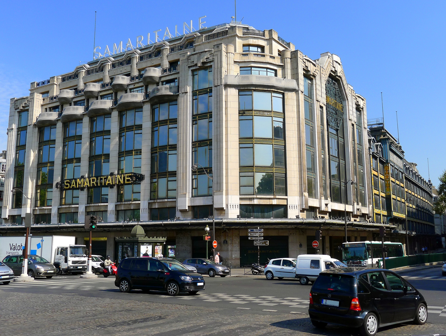 La Samaritaine - Paris Ier. Architectes : Frantz Jourdain (1847-1935) et Henri Sauvage (1873-1932).